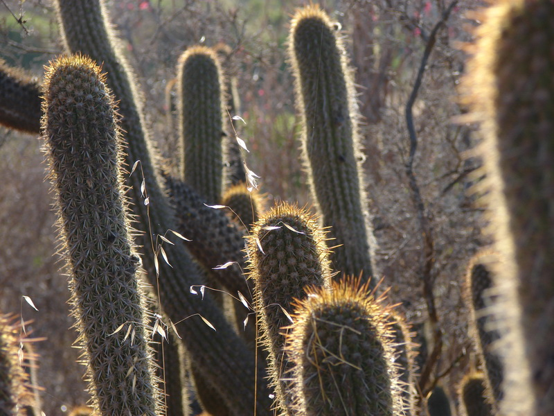 Echinopsis chiloensis ssp. litoralis and Avena barbata, Flora de la zona de Los Vilos